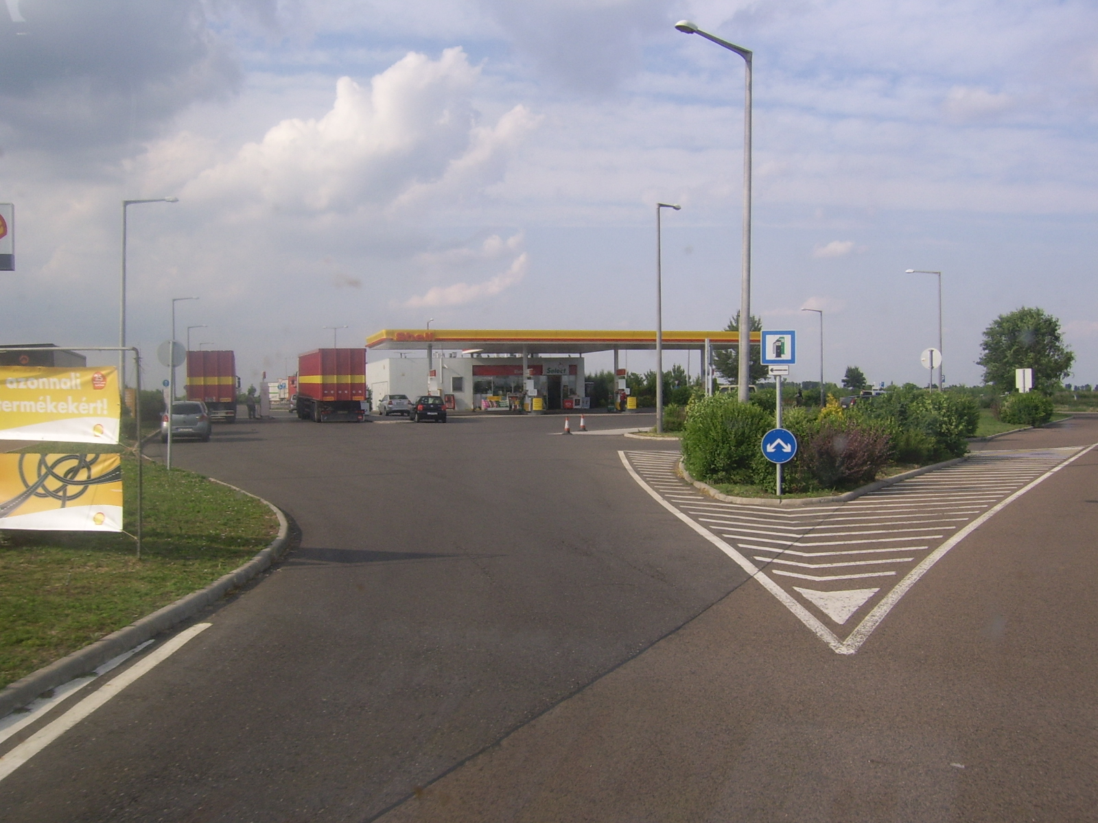 Az M3-as 142-es kilométerszelvényében található Geleji pihenőhely